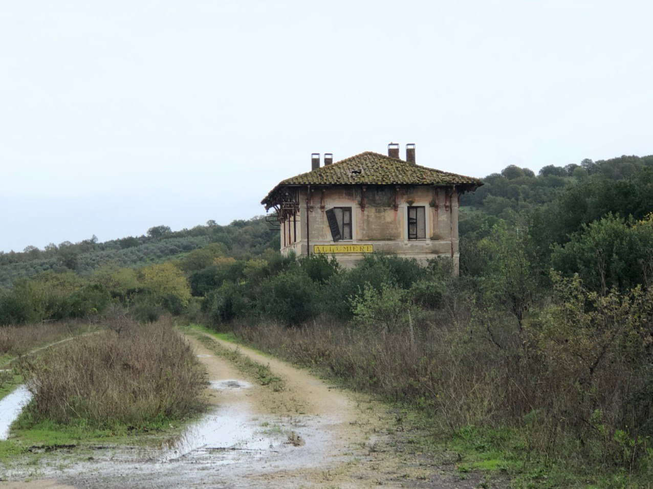 La Ferrovia Civitavecchia-Orte in entrata alla Stazione di Allumiere. Veduta dell'area con il percorso in direzione Orte.